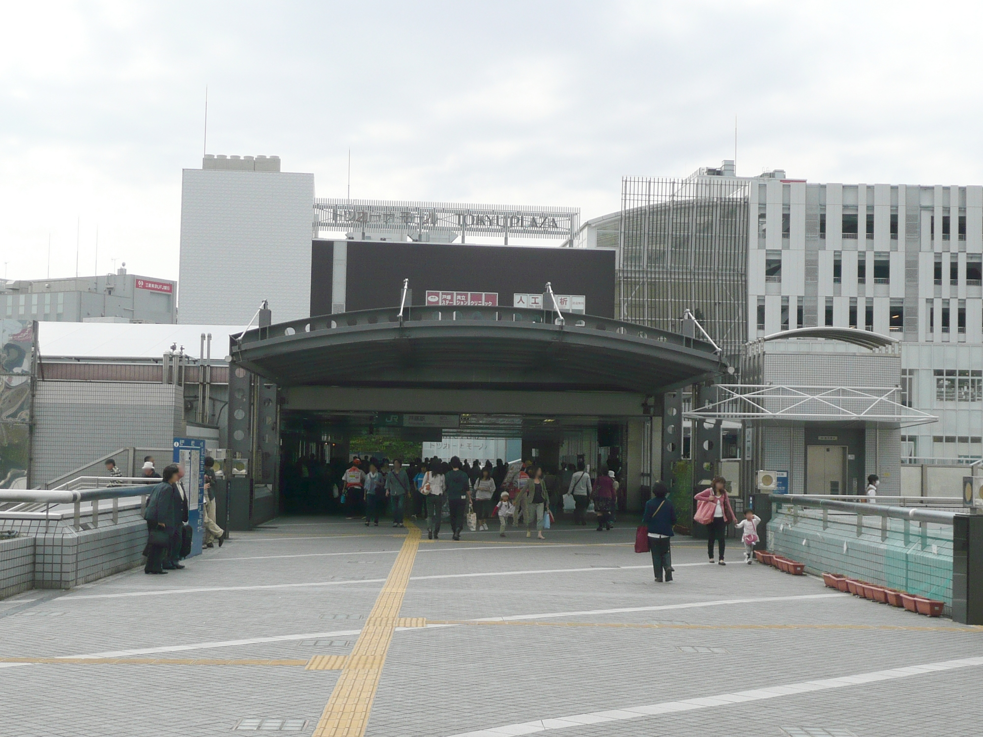 戸塚駅橋上東口